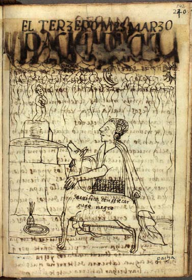 Pacha Pucuy